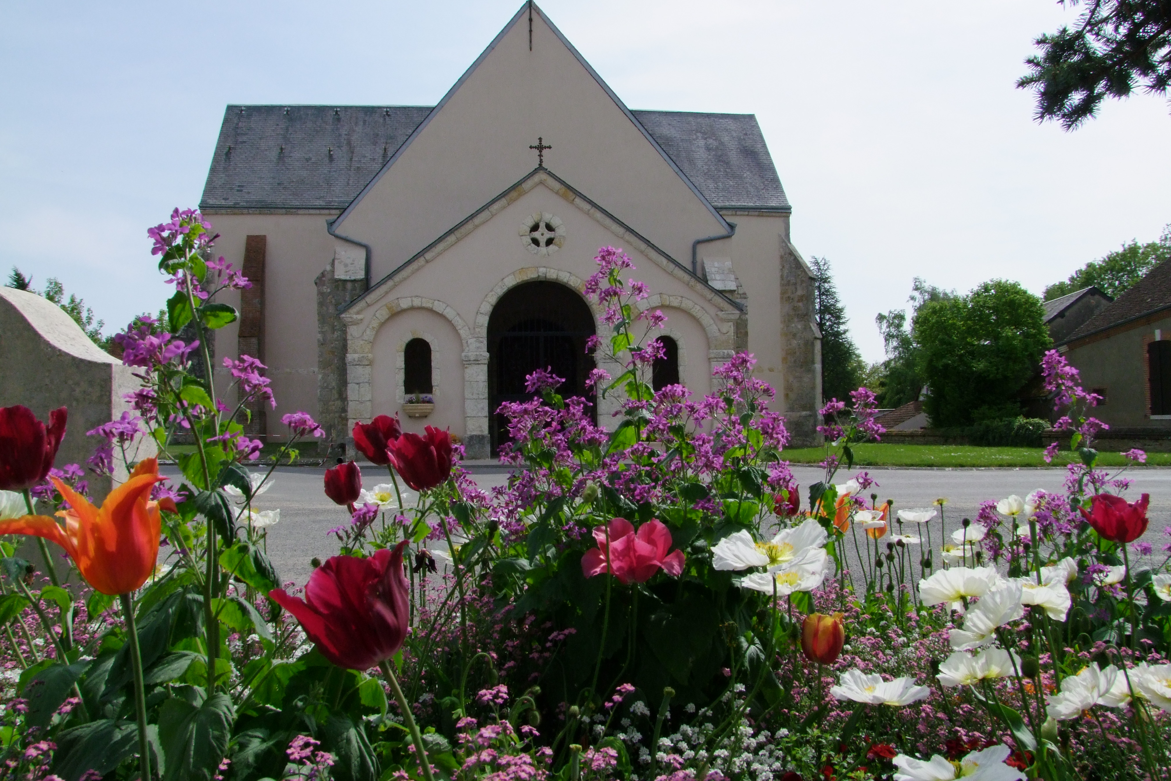 Église de Quiers sur Bezonde